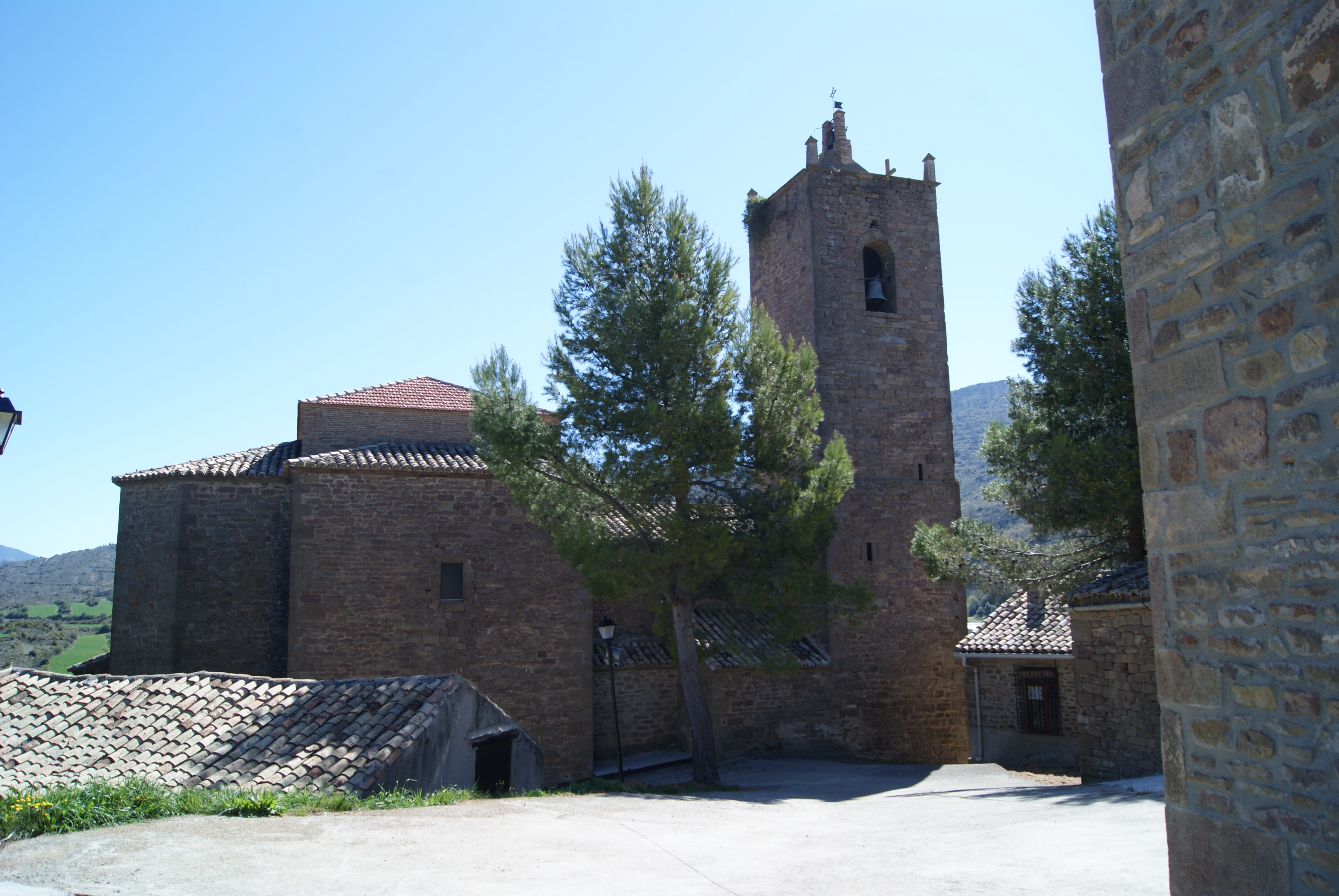 Lobera de Onsella (Zaragoza)